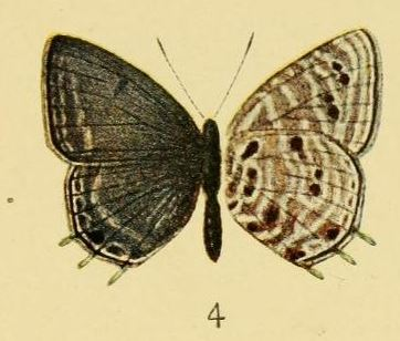 Anthene nigeriae